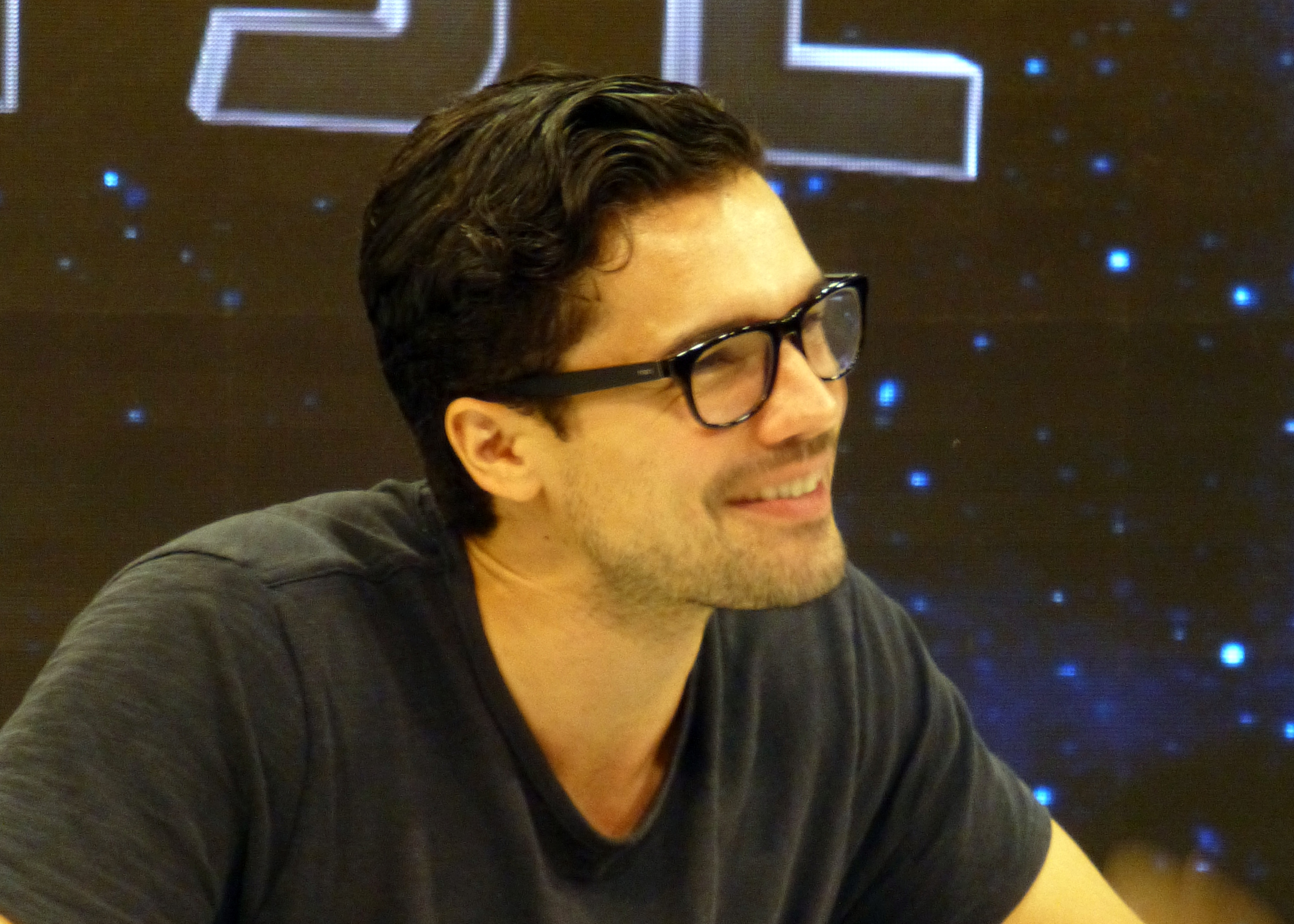 Expanse 10